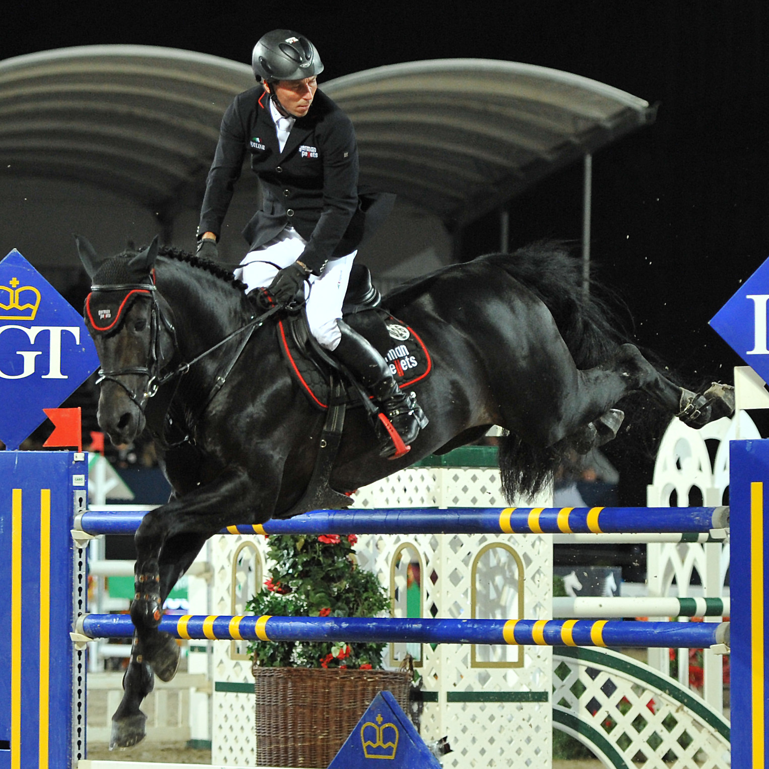 Vienna Masters am 21. September 2013 Longines Global Champions Tour Hans-Dieter Dreher (GER) auf Embassy II